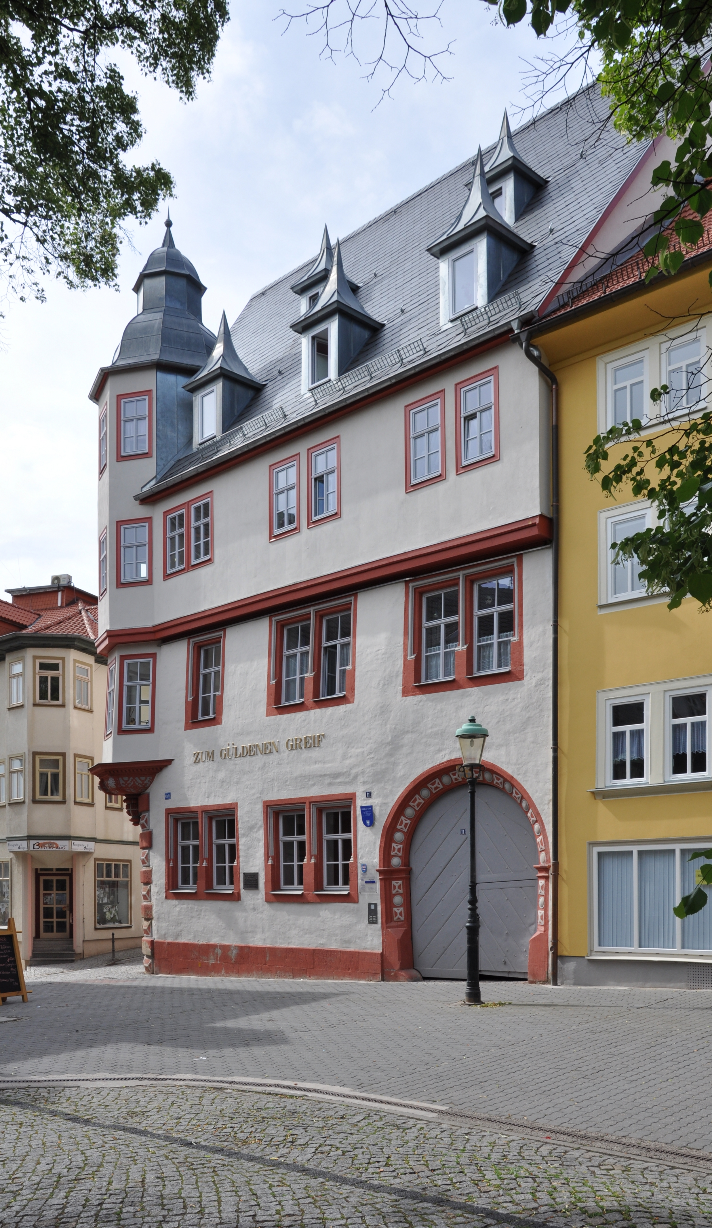 Arnstadt (Thüringen), Marktplatz, Haus zum Güldenen Greif